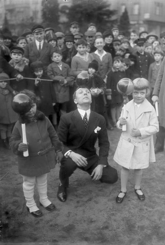 Der berühmte Ball-Künstler Rastelli zeigt seine Kunst Berliner Kindern! Der berühmte Ball-Künstler Rastelli bei einer Gratisvorstellung vor Kindern in den Strassen Berlins.